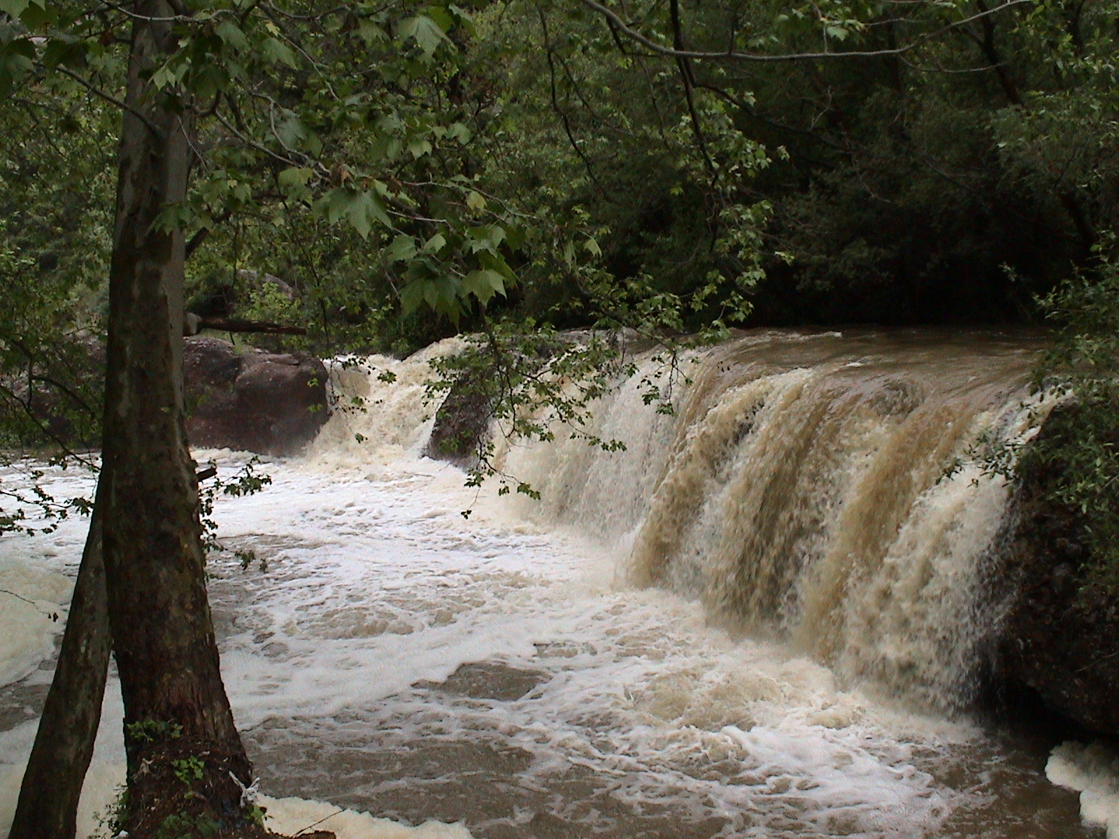 El Gorg d'en Jeroni (Riells del Fai, Bigues i Riells, Vallès Oriental)